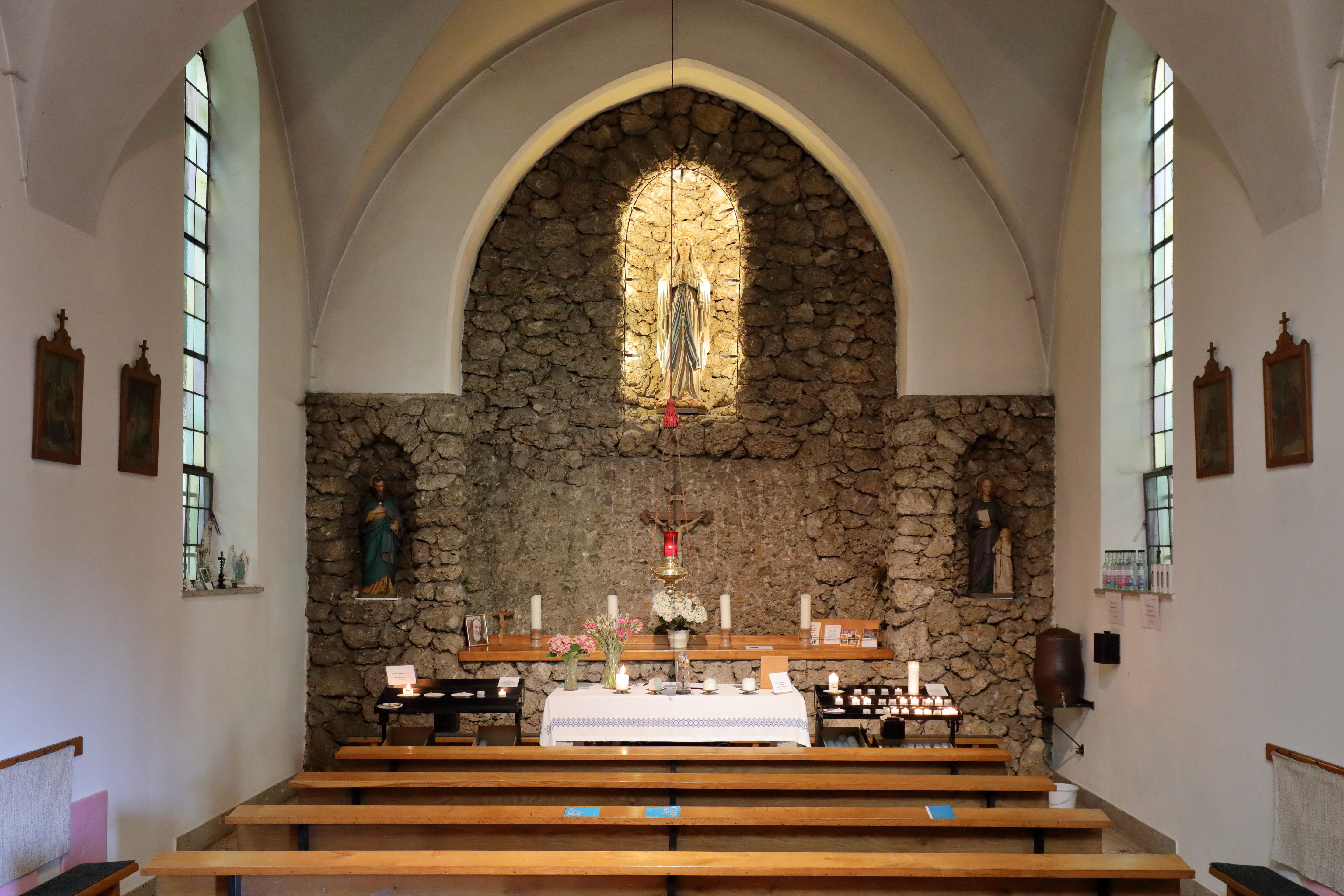 Innenansicht der 1906 geweihten Maria-Lourdes-Kirche in Hildprechting, ein Ortsteil der oberösterreichischen Gemeinde Ohlsdorf.